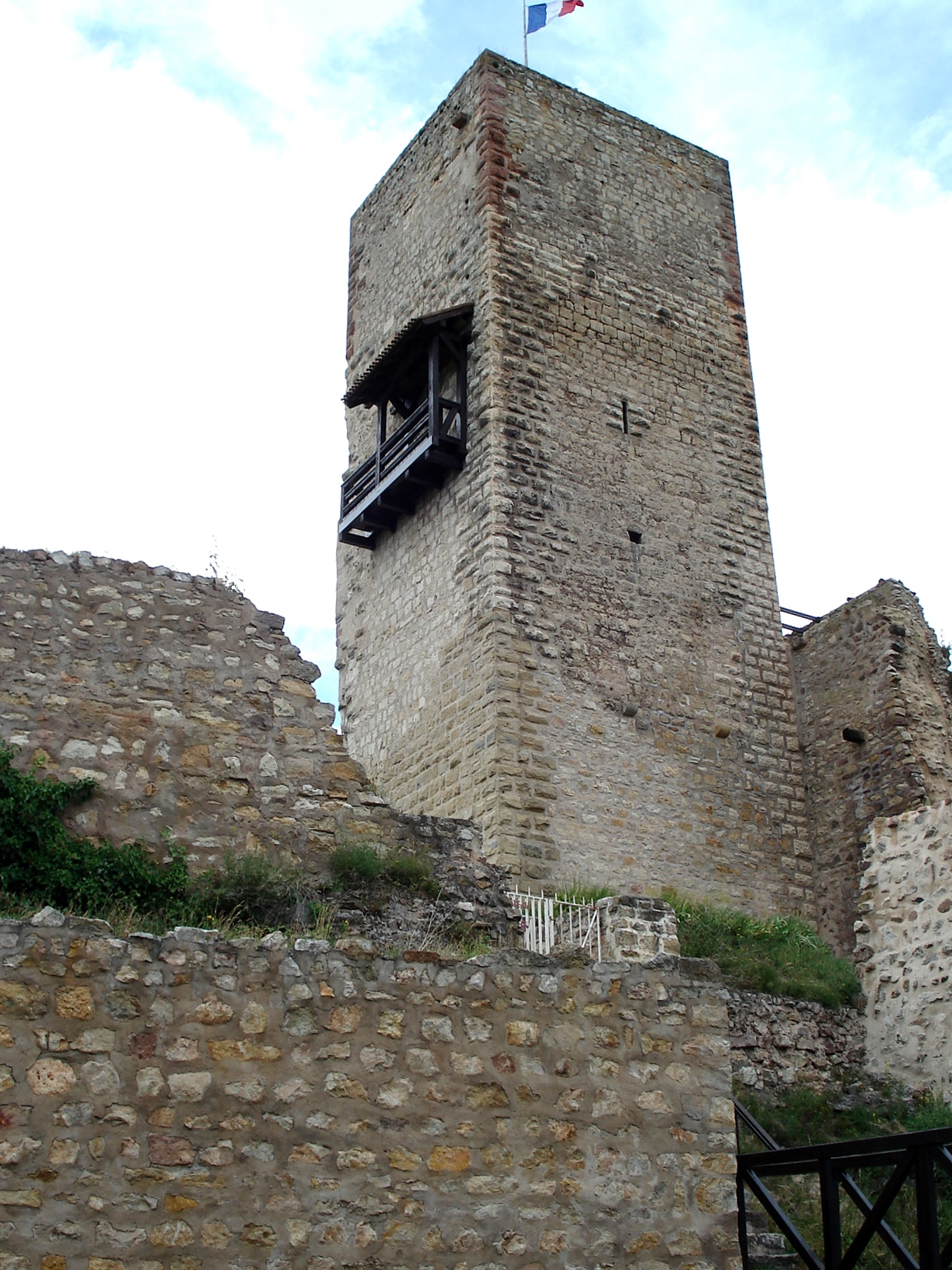 Château ruiné du Wineck, dans la commune de Katzenthal, dép. du Haut-Rhin, Alsace, France. Édifié au XIIe siècle, et partiellement restauré au début de la décennie 1970.